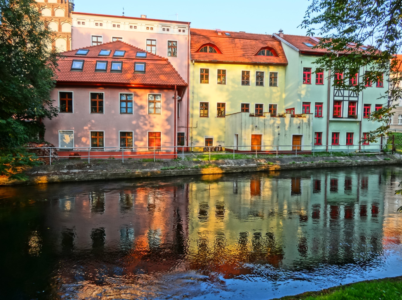 Wenecja Bydgoska – zespół architektoniczny Starego Miasta w Bydgoszczy zbudowany bezpośrednio nad rzeką Młynówką.